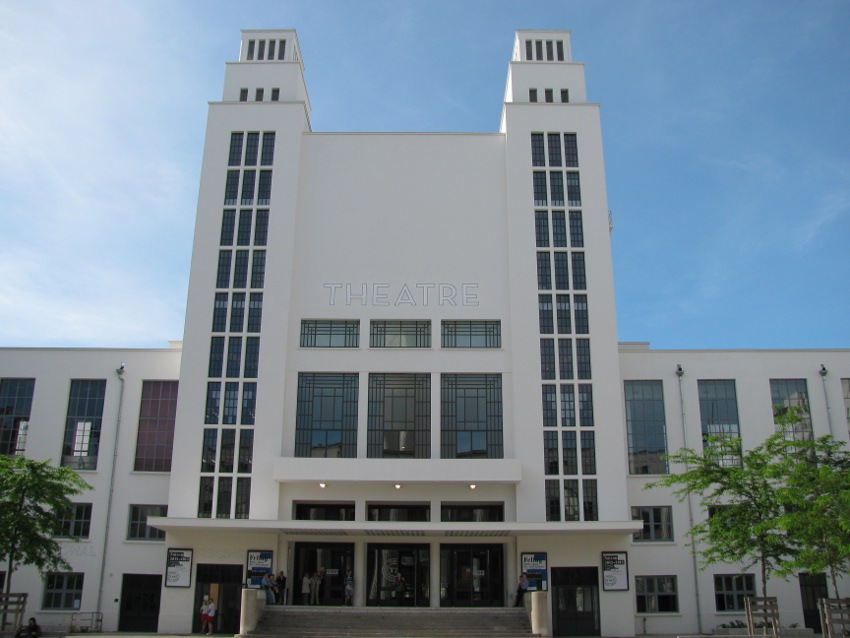 Façade du TNP après la rénovation de 2011